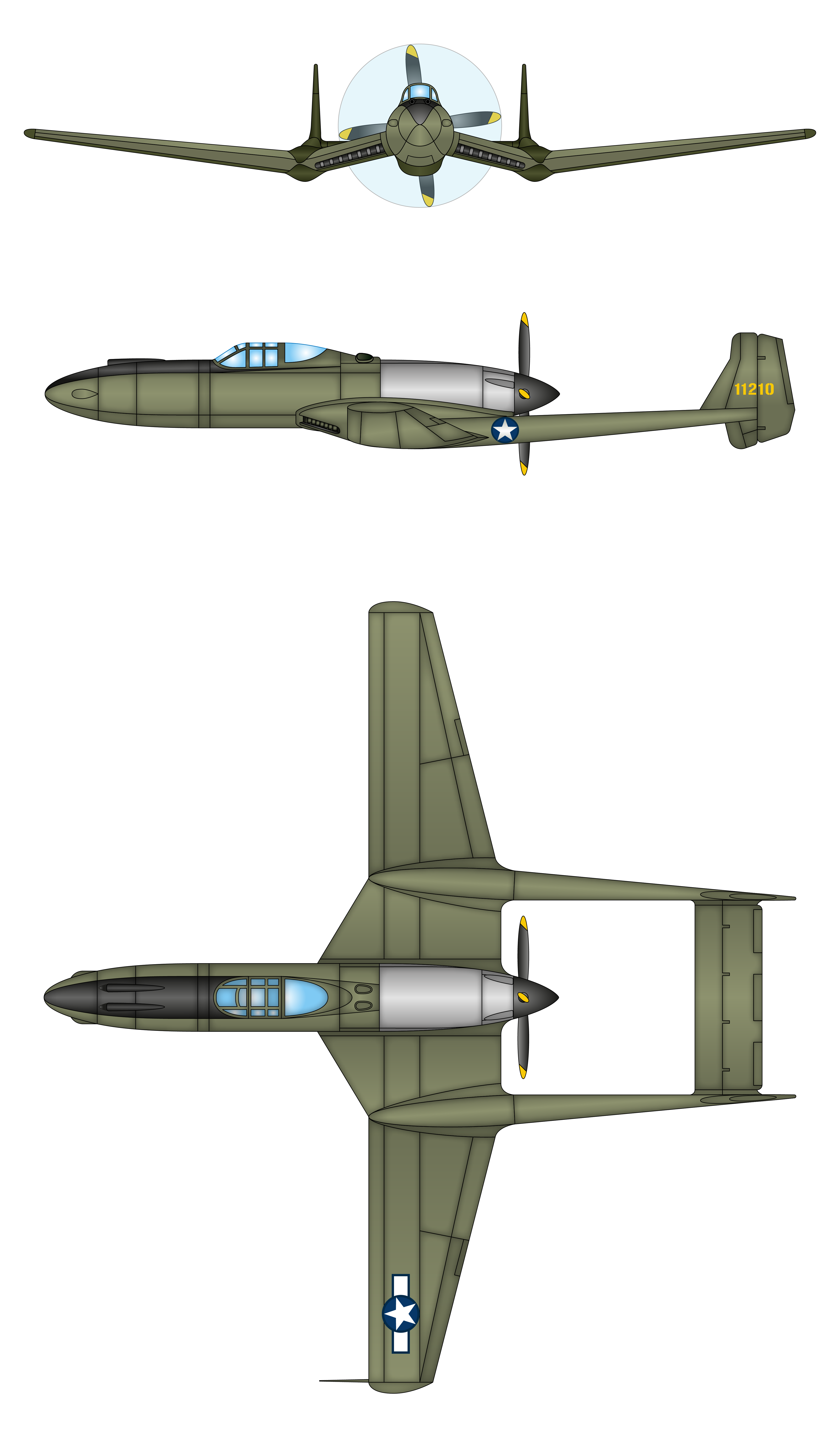 Vultee XP-54, era un Aereo da caccia sperimentale Statunitense (primi anni quaranta) dell’ Azienda Vultee Aircraft